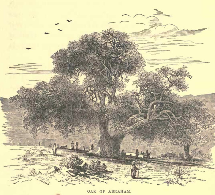 Hebron Abraham oak